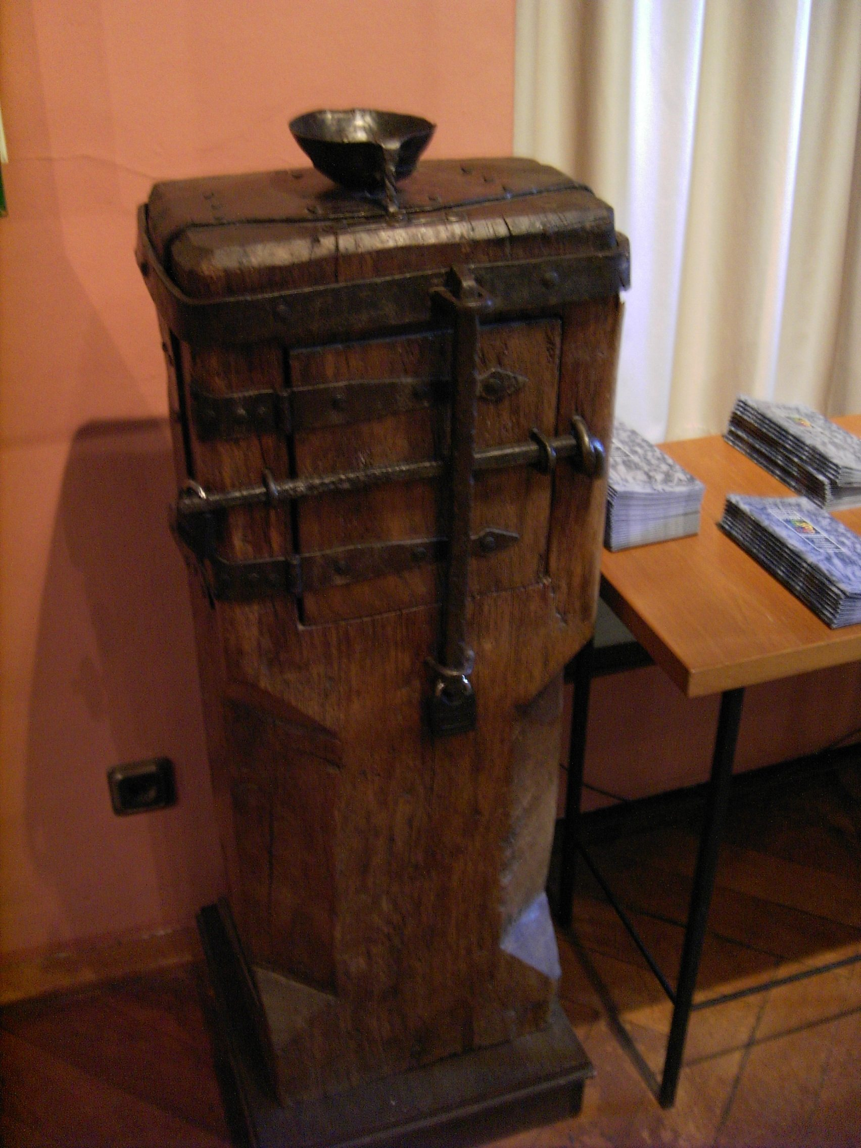 Wartburg, Museum. Mittelalterlicher Opferstock.